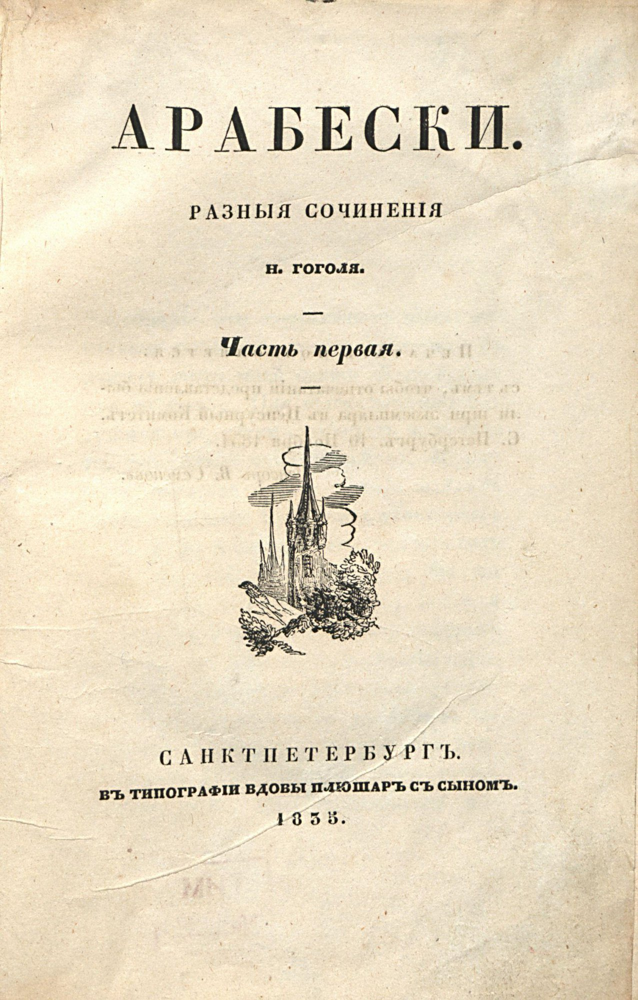 Обложка книги Н. В. Гоголя "Арабески".